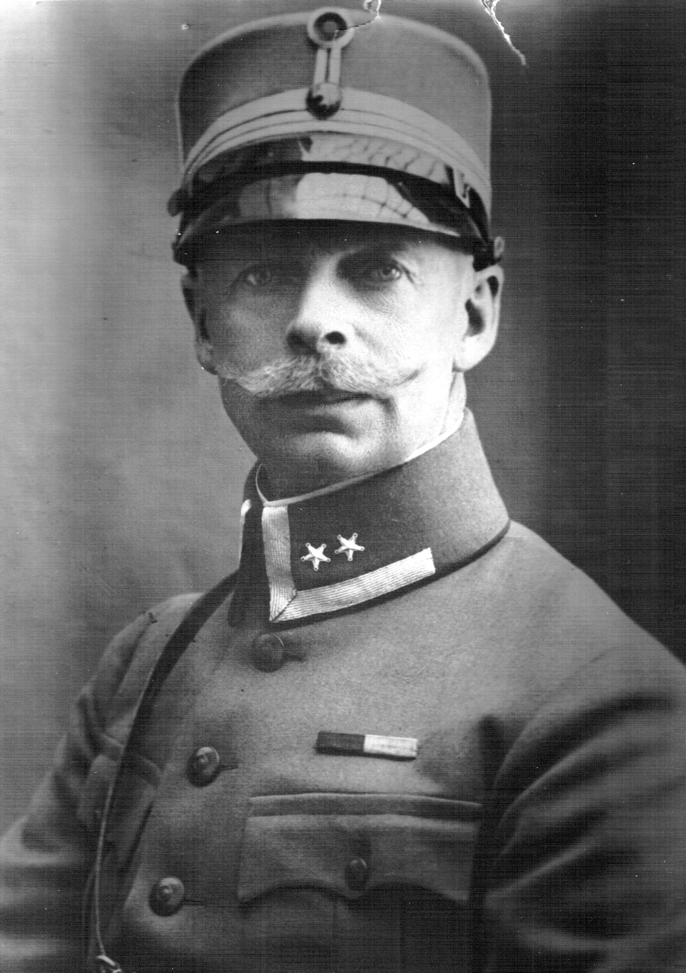 Oberstløytnant Lauritz A. Rodtwitt, kommandant Fossumstrøket festning 1930-1940. Foreningen for Høytorp fort sitt arkiv.